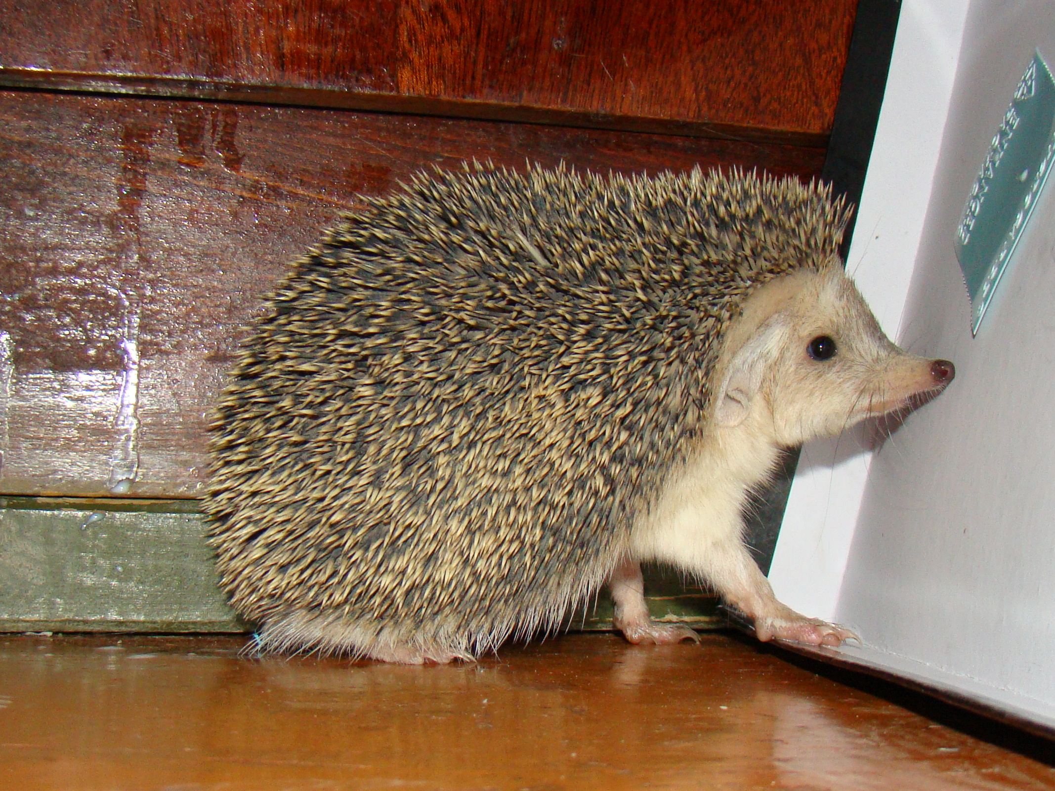 Ушастый ёж (Hemiechinus auritus). Город Байконур, Кызылординская область, Казахстан